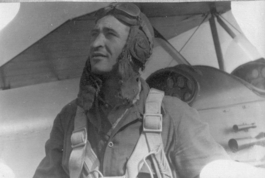 Міхаіл Шаіпаў